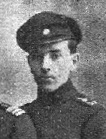 Старший лейтенант Кость Мандрика в однострої морської піхоти УНР (Тинченко, Я. Військово-морські сили України. 1917—1921 рр. — К. : Темпора, 2012), або урядовець Штабу Дивізії морської піхоти Б. Гловацький ([1]), серпень 1919.